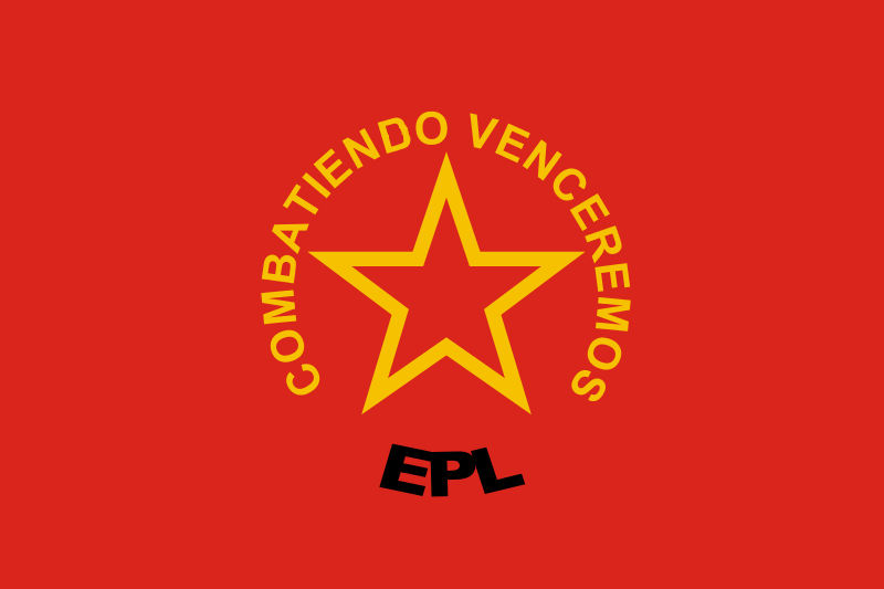 Bandera REAL del Ejército Popular de Liberación.